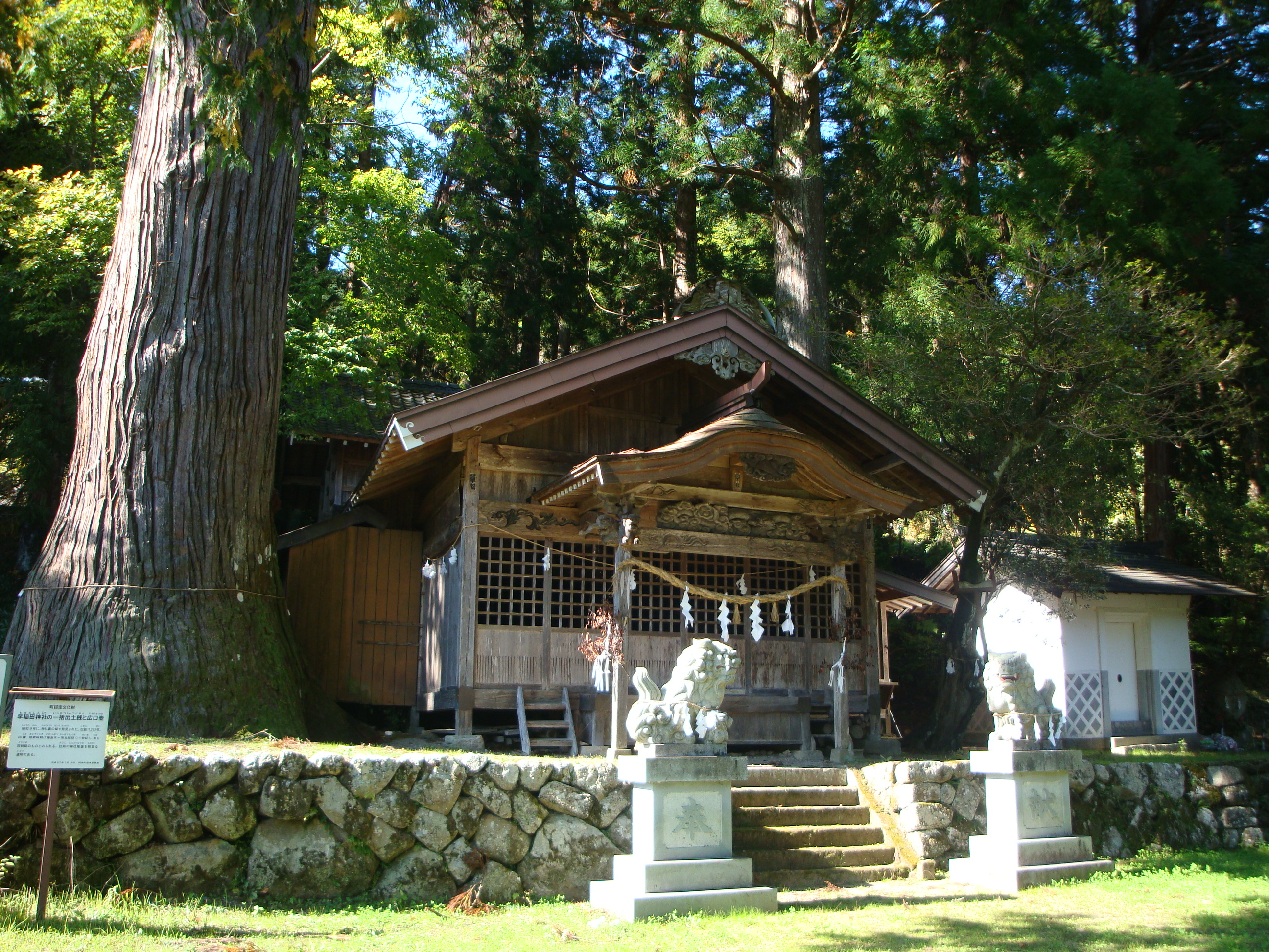 早稲田神社 神木 拝殿 宝庫 長野県阿南町